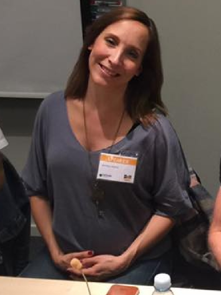 Annika Herlitz på Kistamässan, 16 september 2017